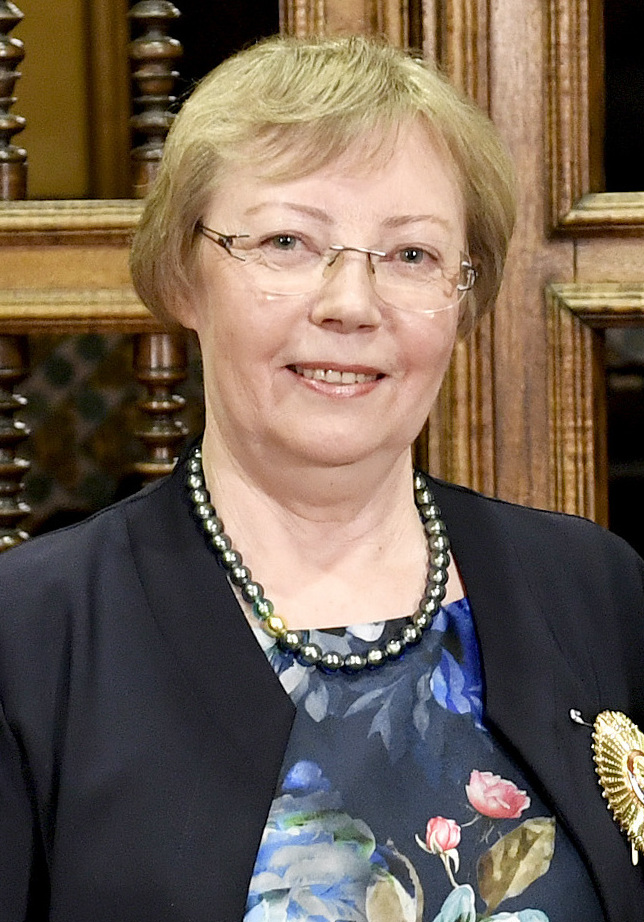 El canciller Nestor Popolizio impuso la condecoración de la Orden al Mérito por Servicios Distinguidos, en el Grado de “Gran Oficial”, a la Dra. Juliane Koepcke, en reconocimiento a su labor científica y académica enfocada en la Amazonía peruana.